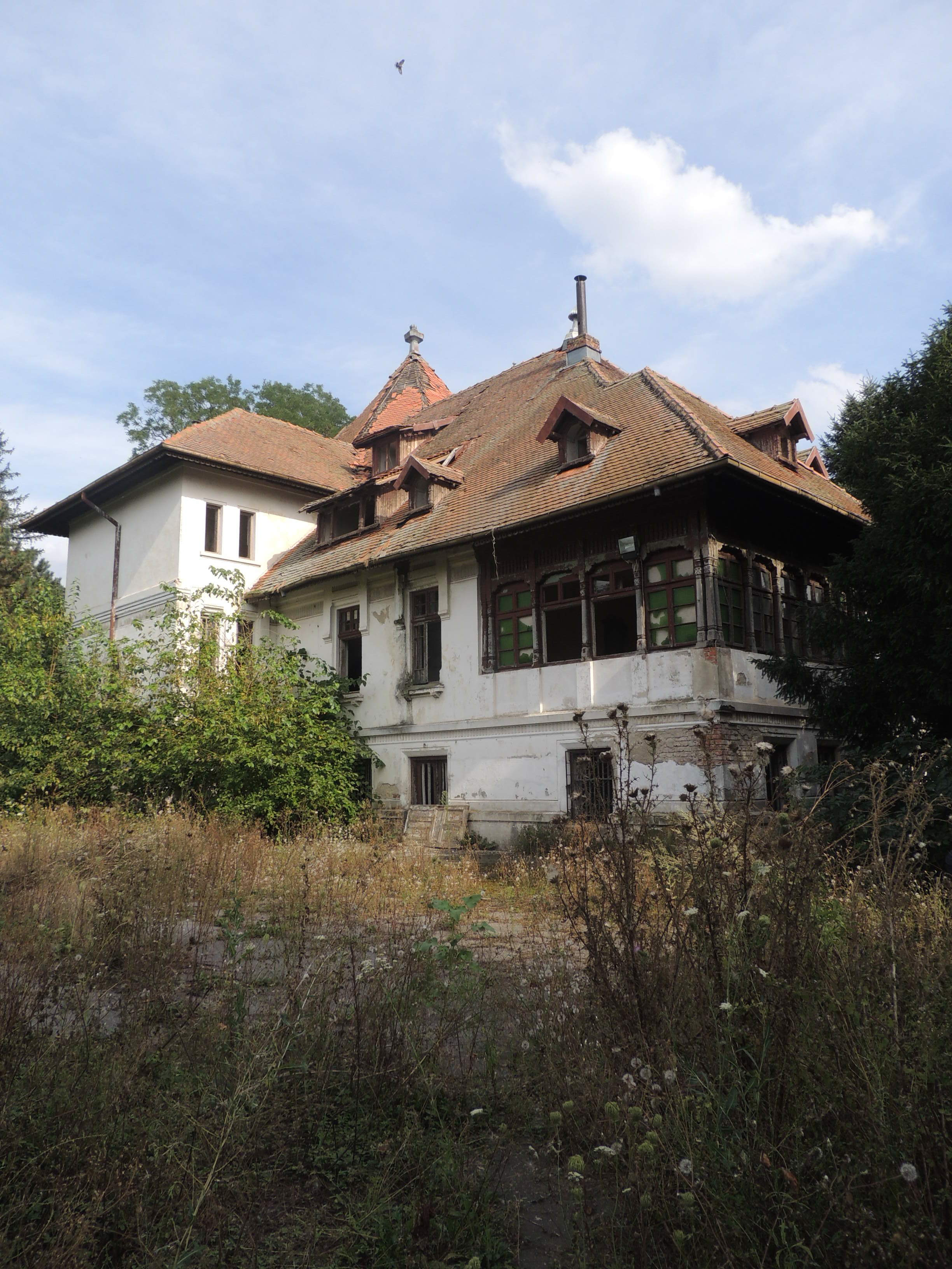 fațada dinspre grădină